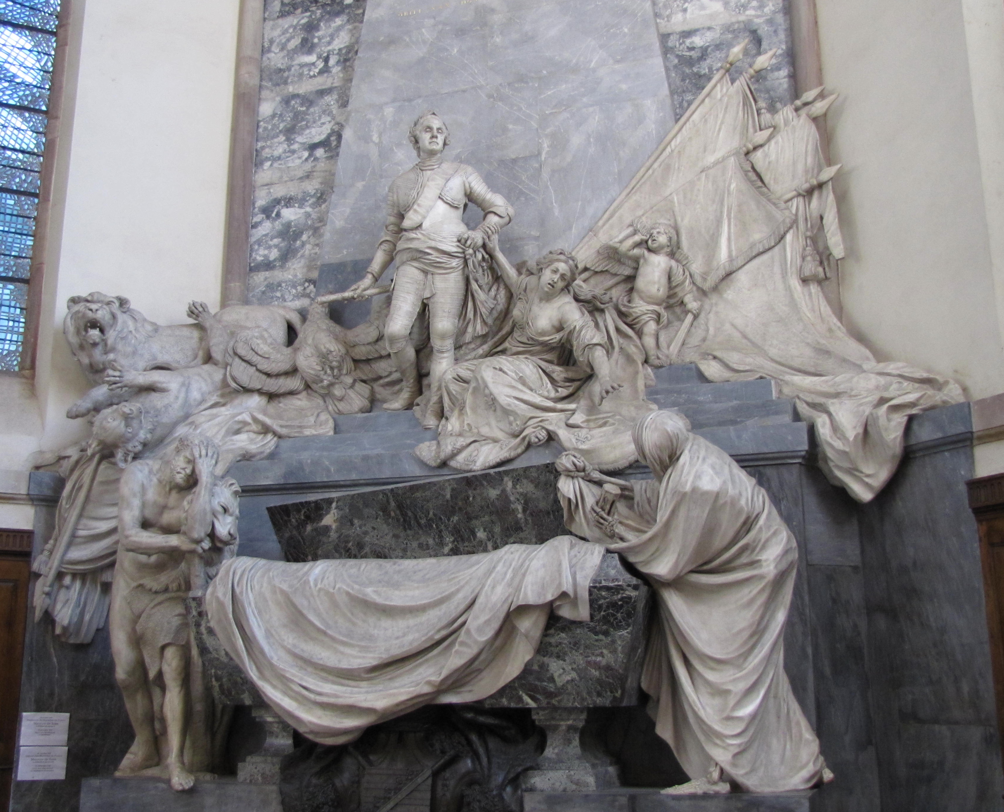 Alsace, Bas-Rhin, Église protestante Saint-Thomas de Strasbourg, 4 rue Martin-Luther (PA00085032). Mausolée du Maréchal de Saxe par J.B.Pigalle (1777)